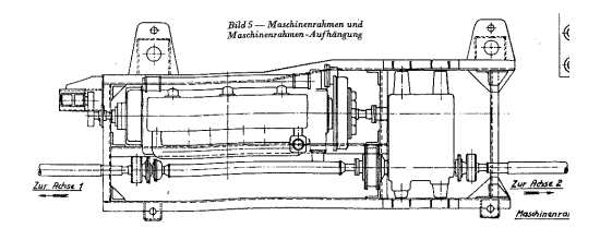 Antriebsanlage des VT 1/2 mit zwei angetriebenen Achsen